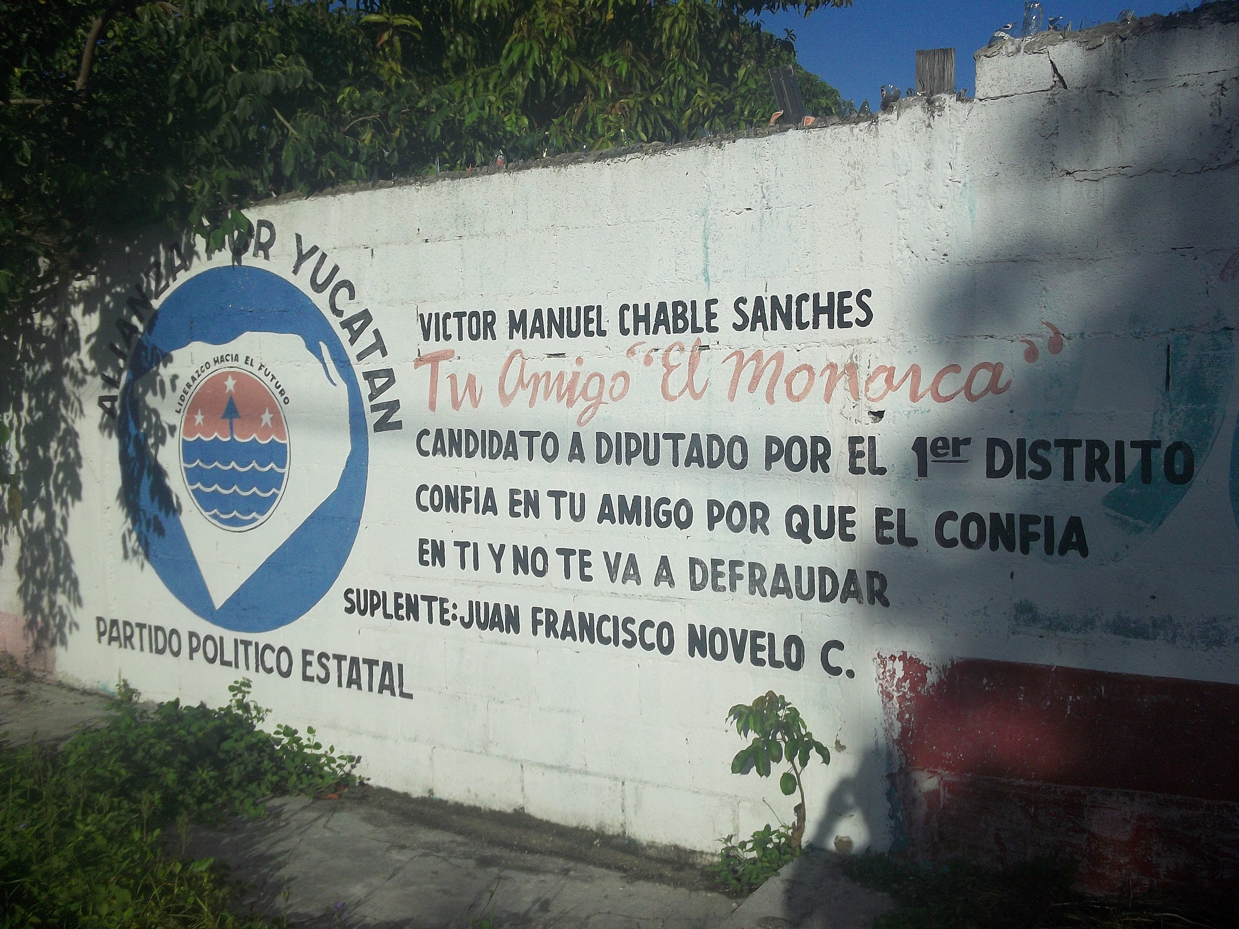 Propaganda del Partido Alianza por Yucatán, Mérida, Yucatán.